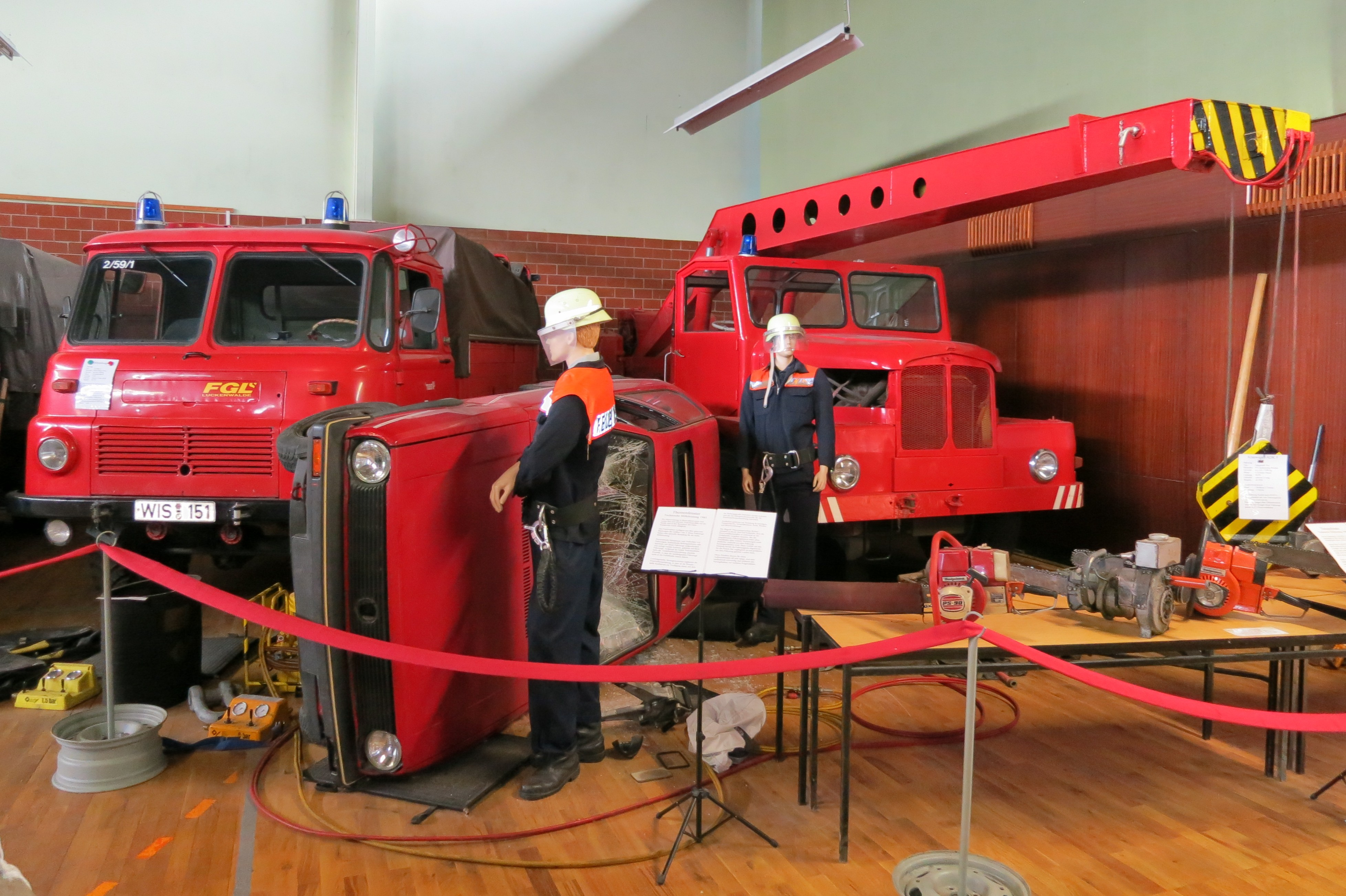 Internationales Feuerwehrmuseum Schwerin